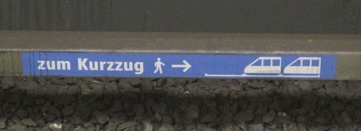 Hinweis am Gleis der Münchner U-Bahn, wo die Kurzzüge halten